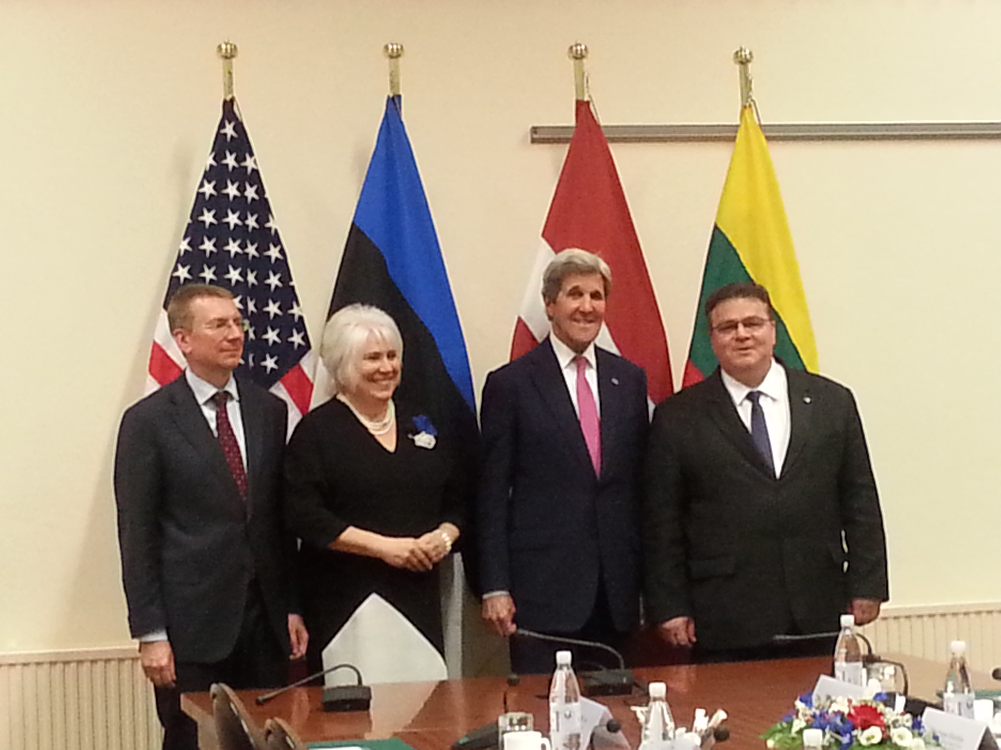 Edgars Rinkēvičs, Marina Kaljurand, John Kerry, Linas Linkevičius